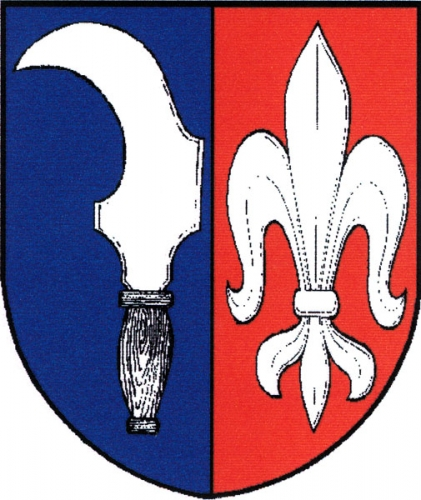 znak, Nový Šaldorf Sedlešovice, okres Znojmo